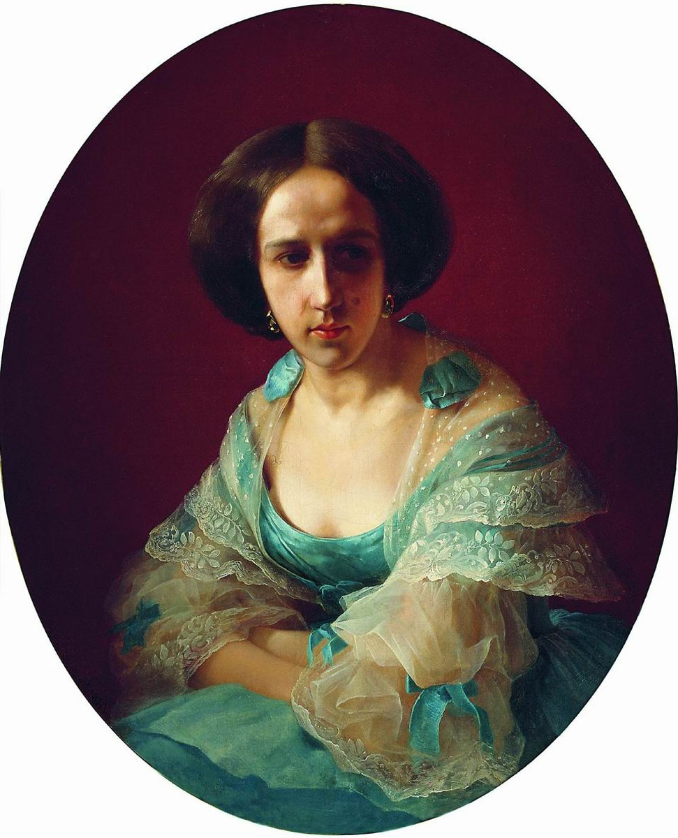 Портрет Софьи Михайловны Третьяковой (1839 – 1902), с 1862 года жена архитектора А. С. Каминского. Направление: Академизм